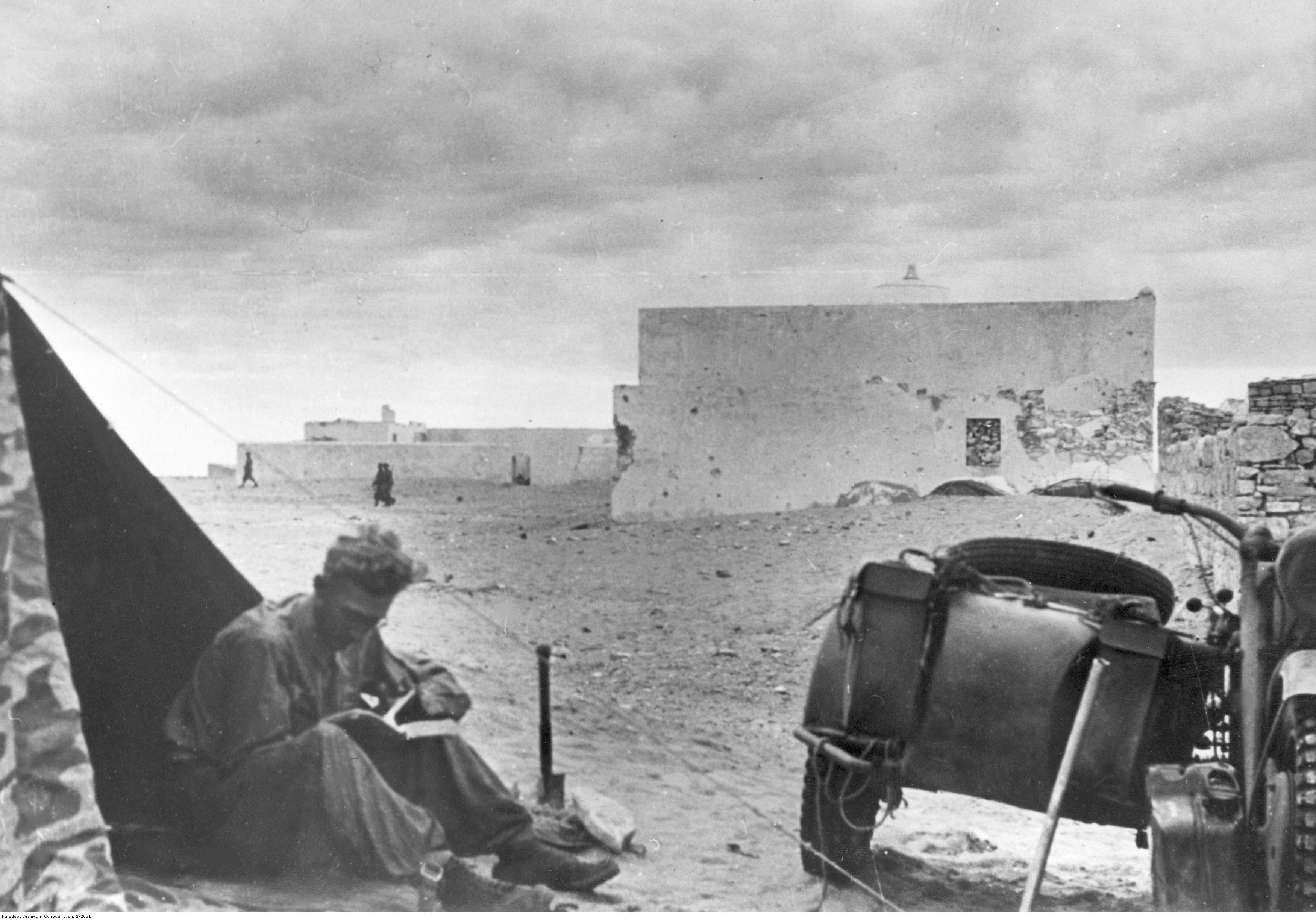 Stanowisko brygady spadochronowej "Ramcke" na froncie w Afryce Północnej. Widoczny żołnierz przed namiotem i motor z koszem; w tle zabudowania.